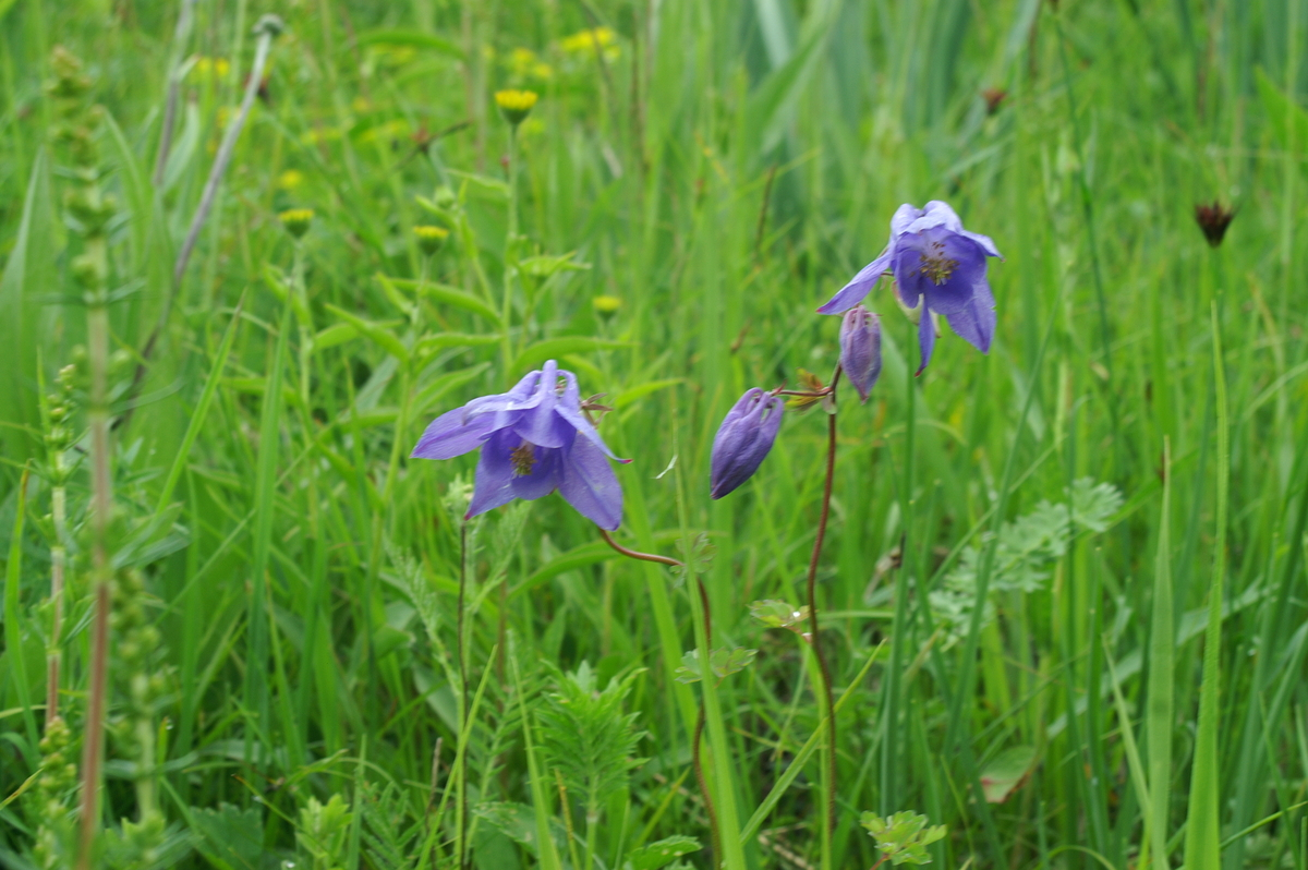 Aquilegia nigricans at Mrzlica